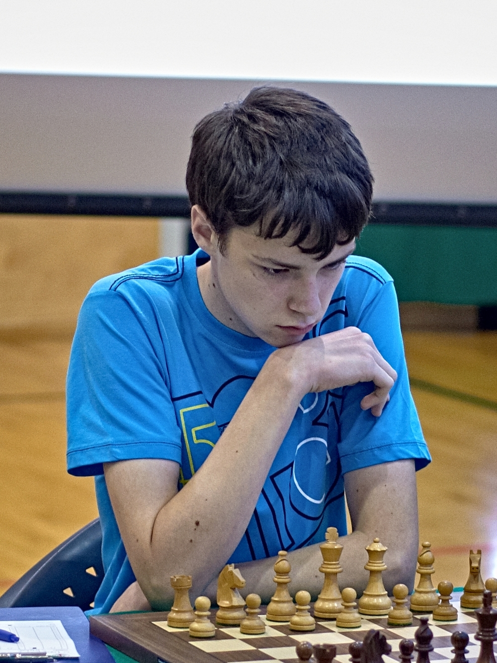 IM Kamil Dragun, Memoriał Mieczysława Najdorfa, Warszawa 2012.